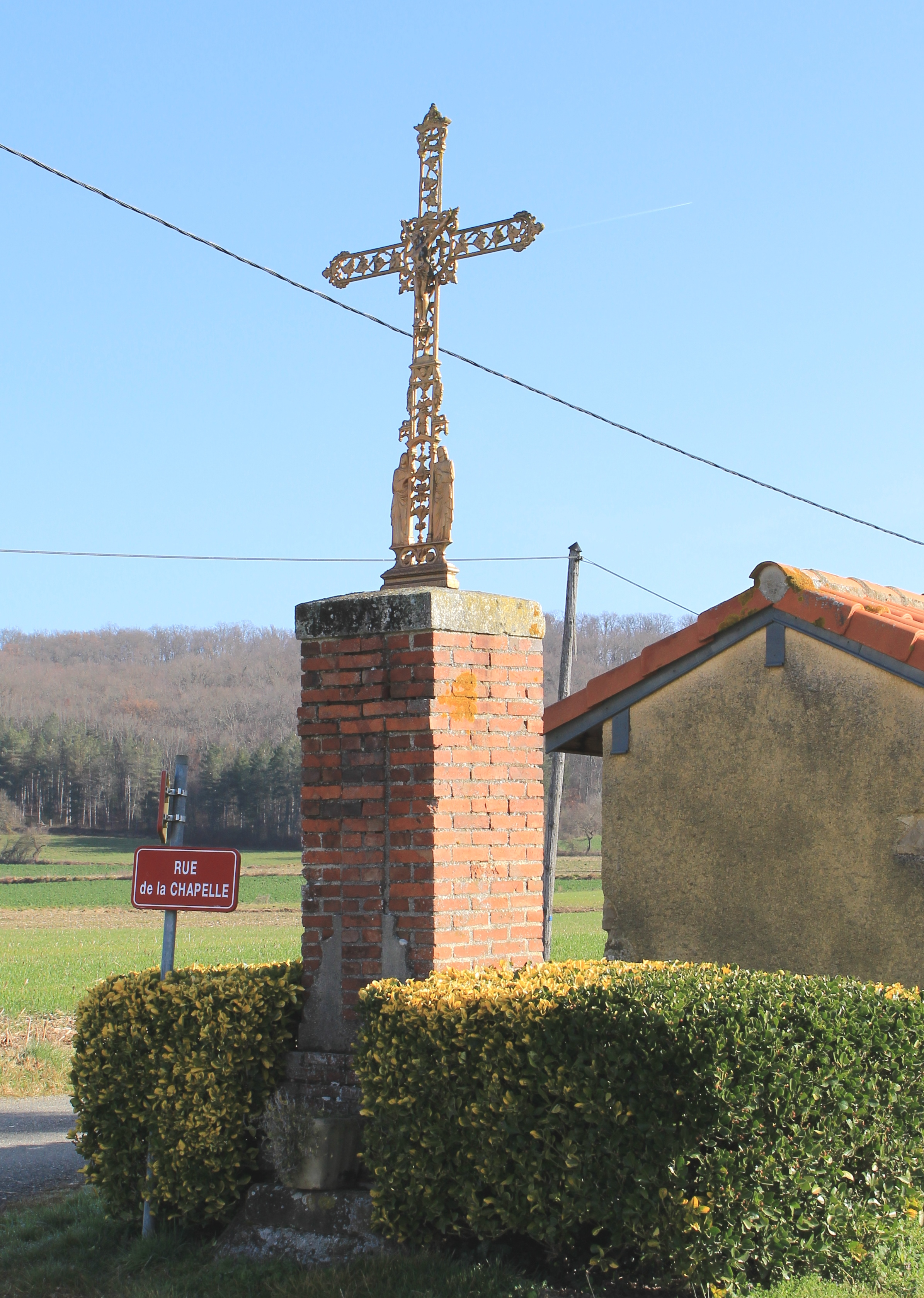 Croix de Trouley-Labarthe (Hautes-Pyrénées)